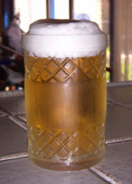 Canya de cervesaJordi Coll Costa 11:00, 28 May 2005 (UTC)